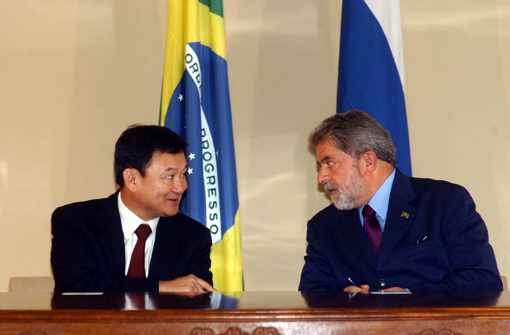 Brasília - O presidente Luiz Inácio Lula da Silva e o primeiro-ministro da Tailândia, Thaksin Shinawatra, durante assinatura de acordos, no Palácio do Planalto. (Foto: Antônio Cruz - ABr)